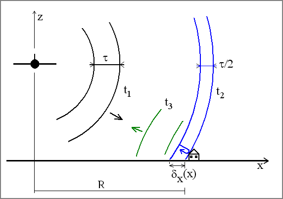 SLAR (oldalra néző légi fedélzeti radar) elvének magyarázatára szolgáló képsorozat 2. tagja